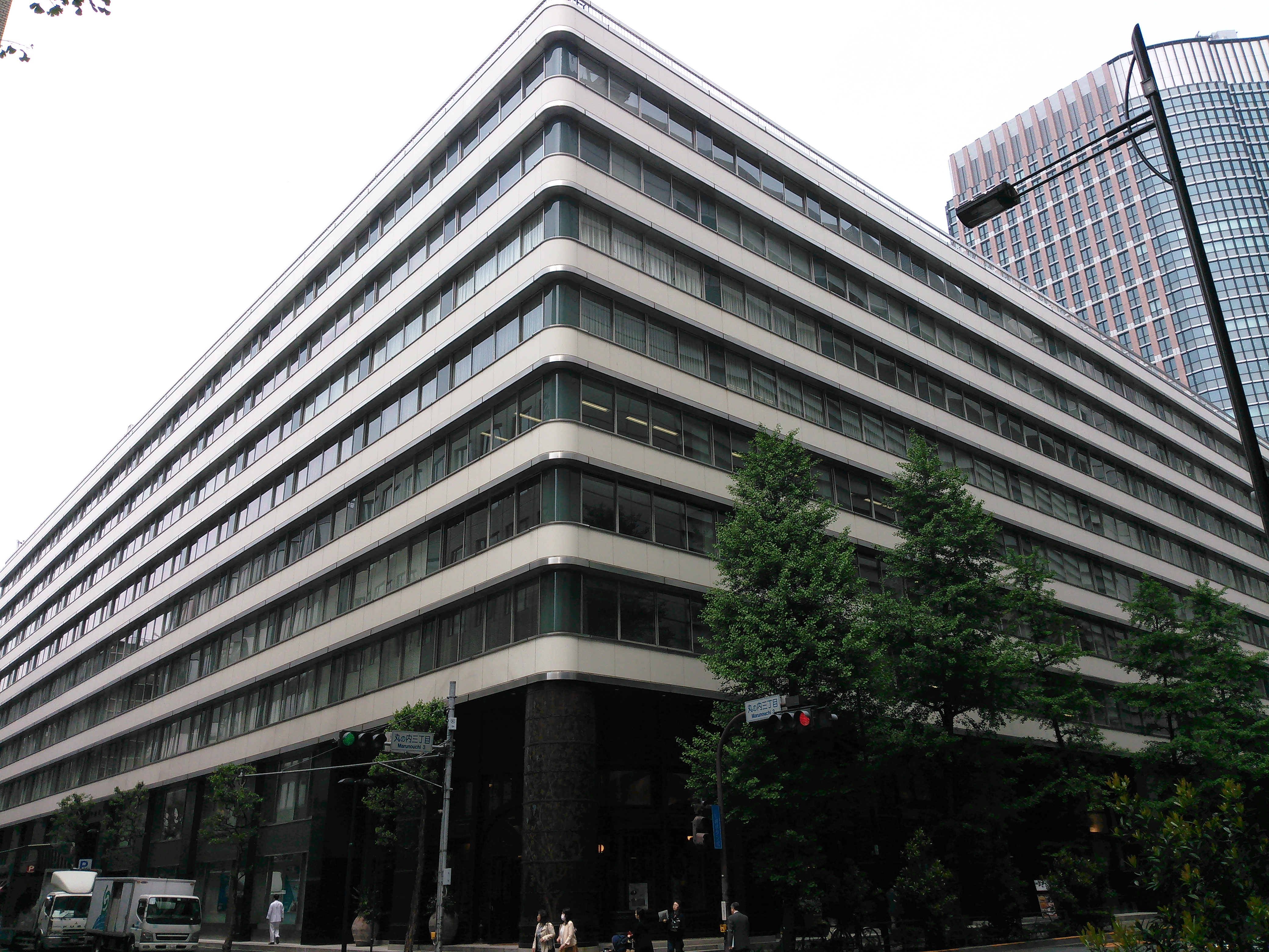 東京・丸の内、新東京ビルヂング